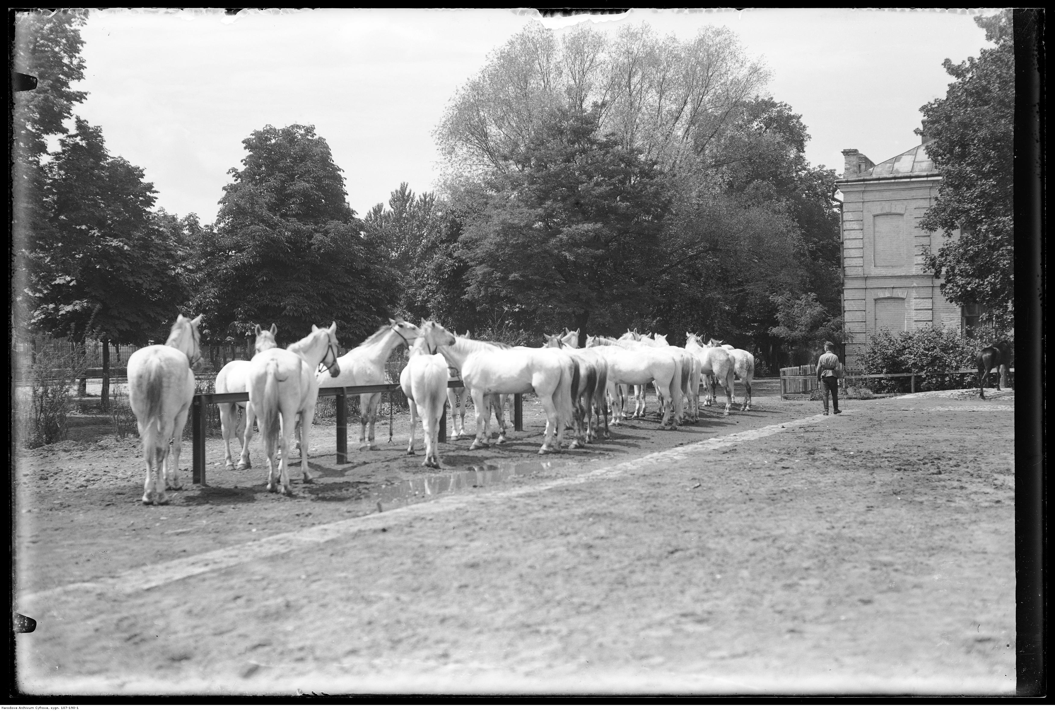 Konie przywiązane na majdanie.